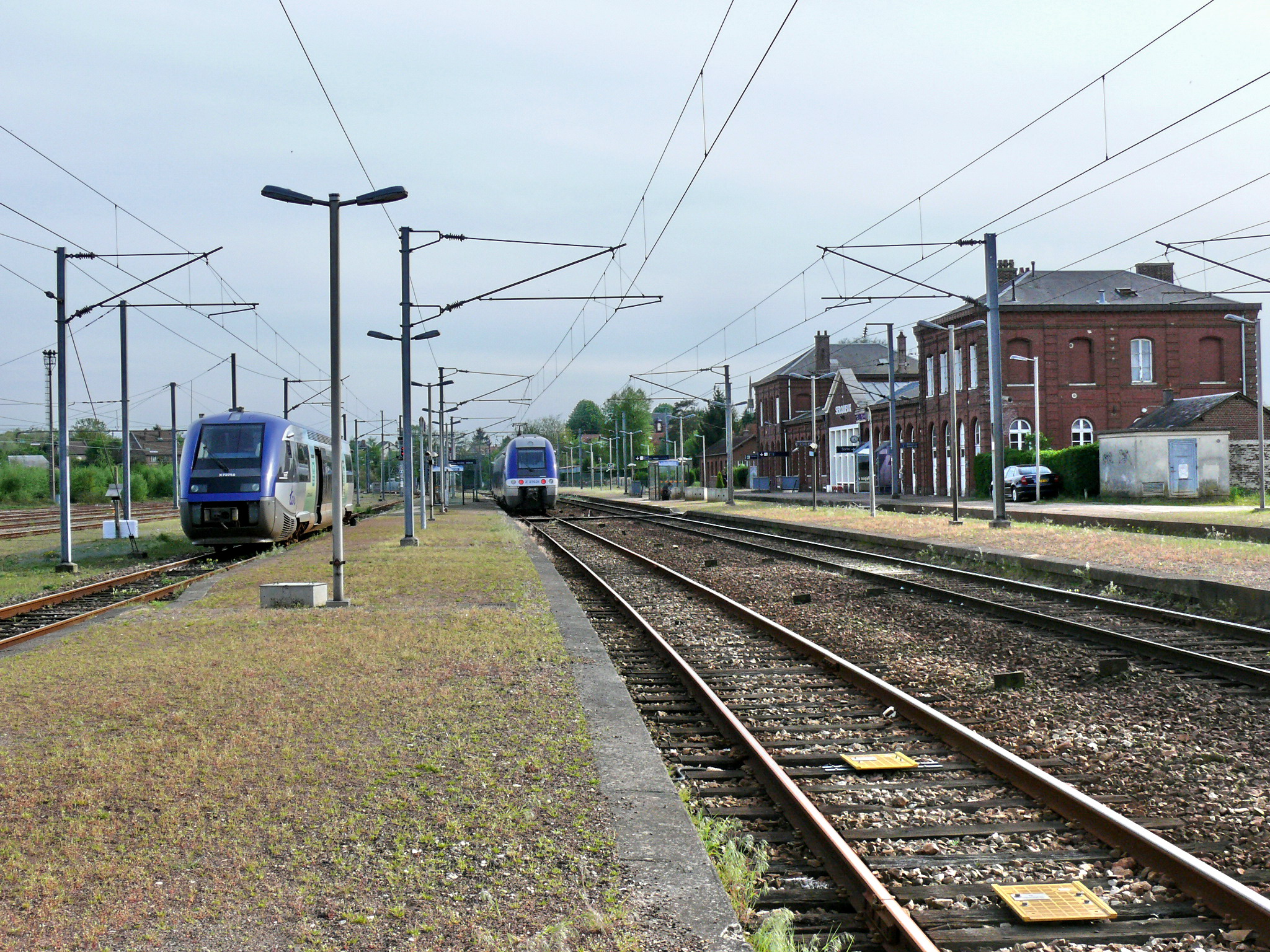 Gare de Serqueux. Au centre, l'automotrice tri-caisses de Bombardier Z 27632 (série Z 27500), à gauche, un autorail série X 73500.